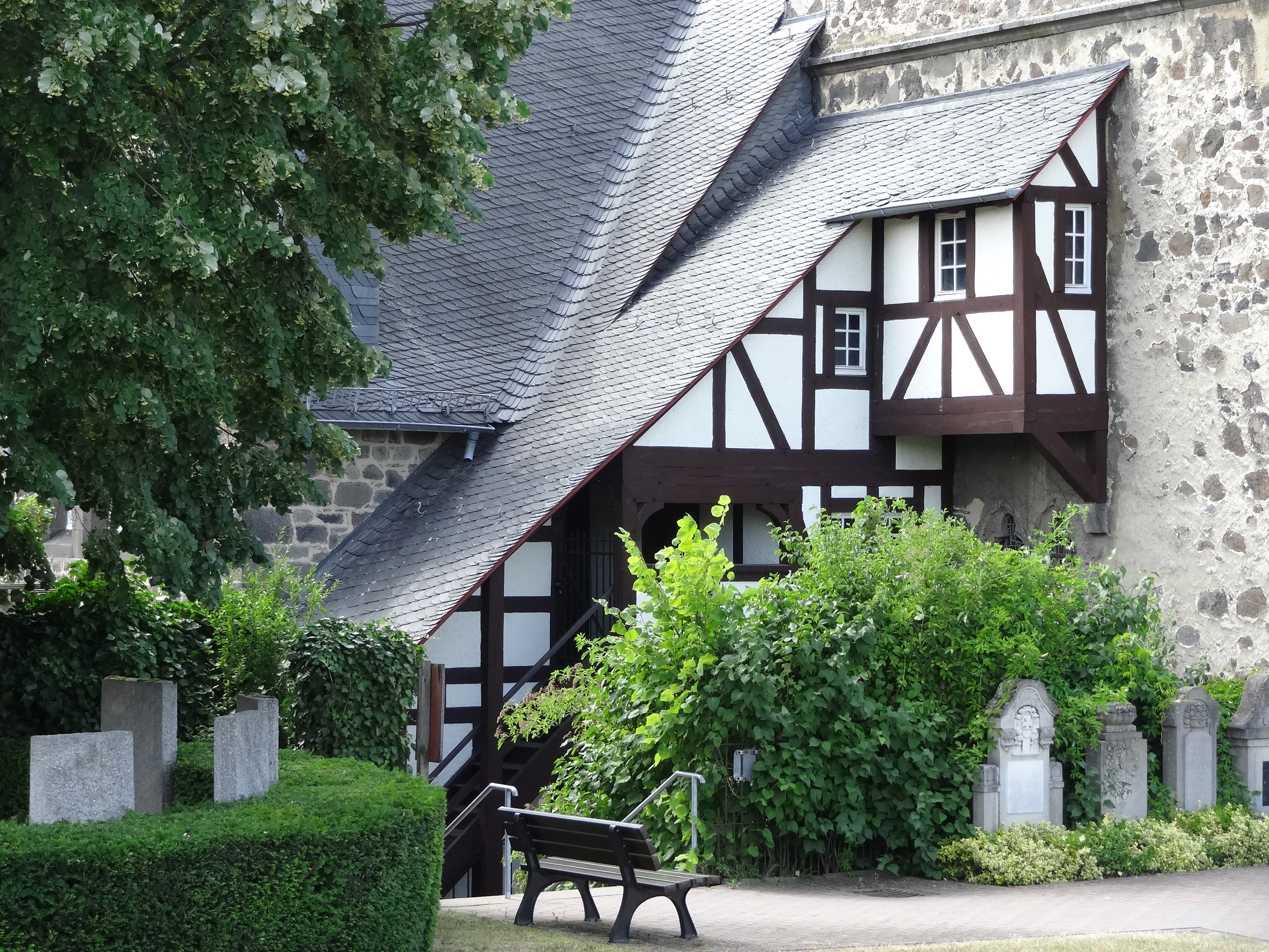 Evangelische Kirche Leihgestern